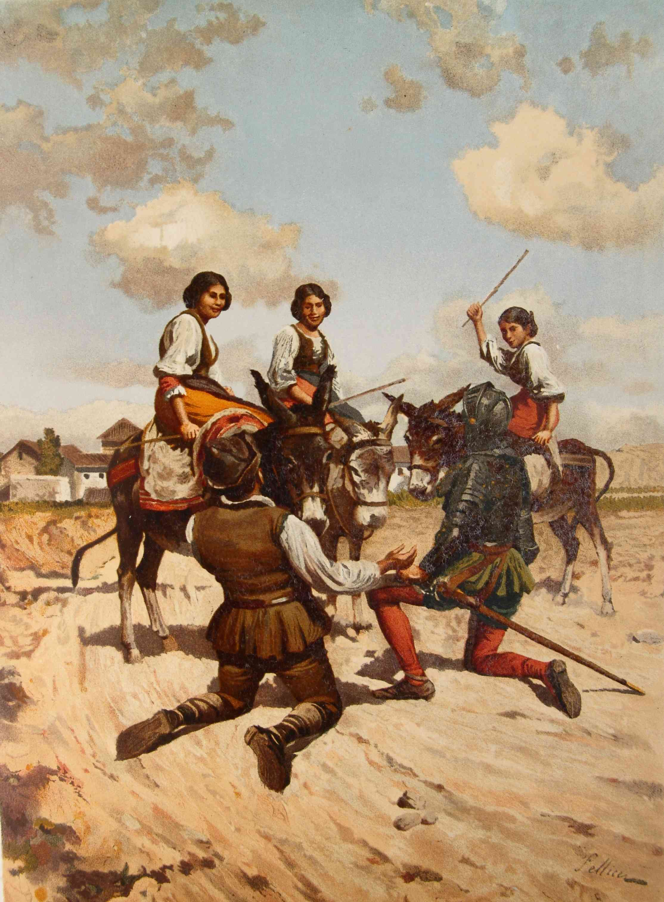 202_153_quijote_cap10